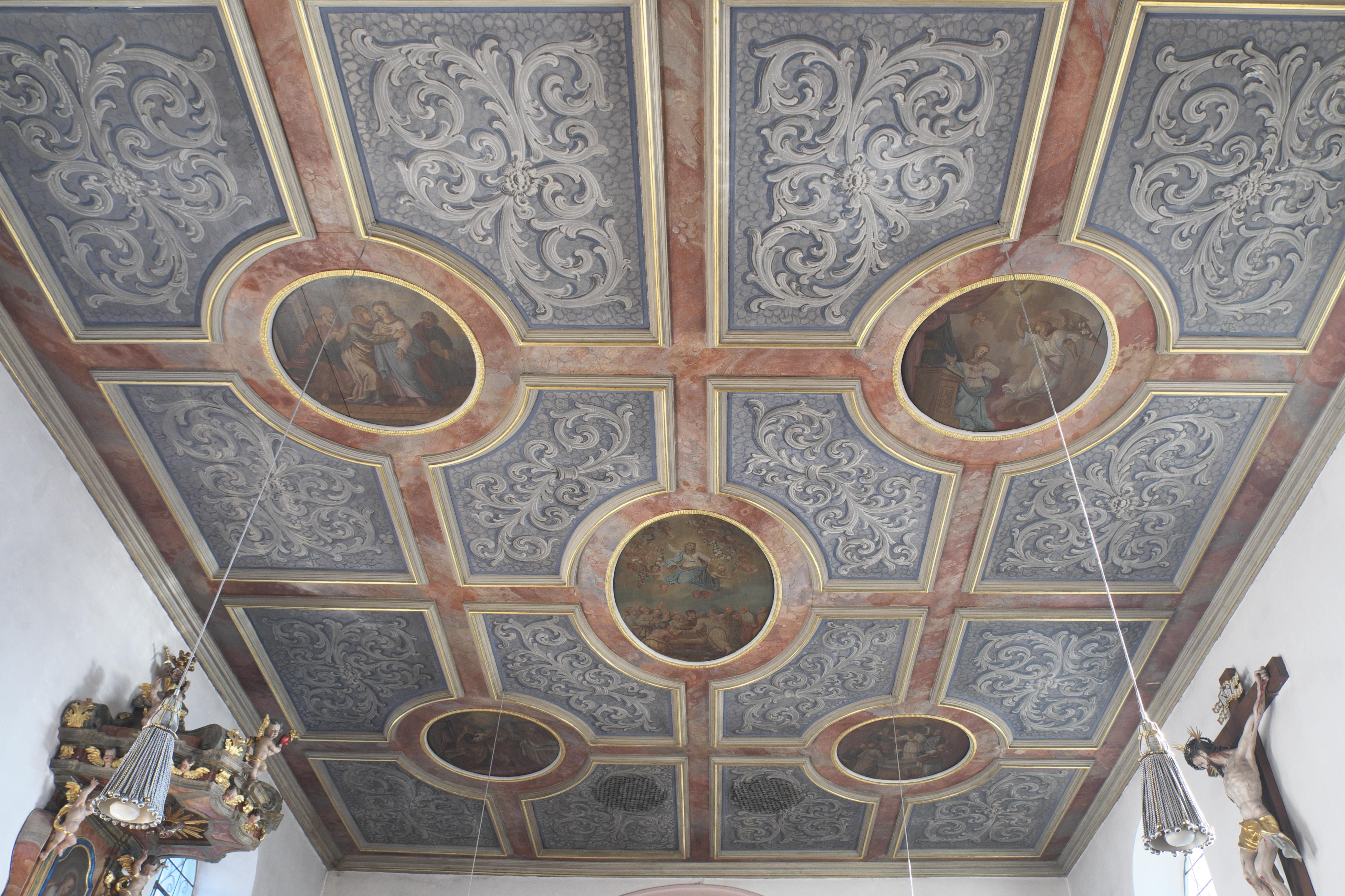 Katholische Pfarrkirche Zur Schmerzhaften Muttergottes in Unterfinning (Finning) im oberbayerischen Landkreis Landsberg am Lech (Bayern/Deutschland), bemalte Holzfelderdecke mit Blattrankenmalerei und Szenen aus dem Marienleben, um 1700